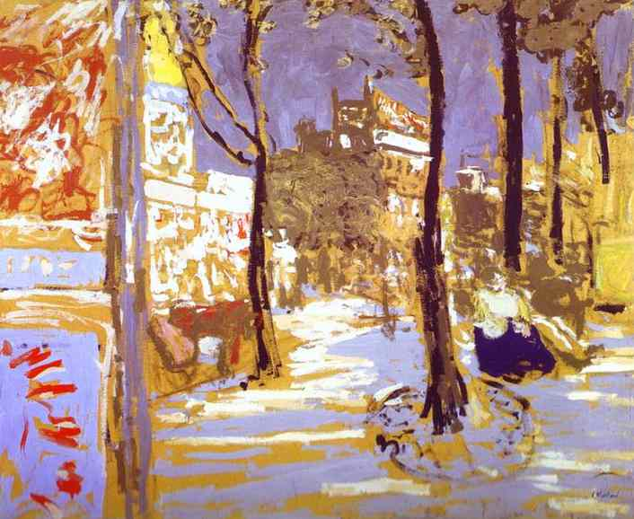 Le Boulevard des Battignolles 78x96 cm, huile sur carton